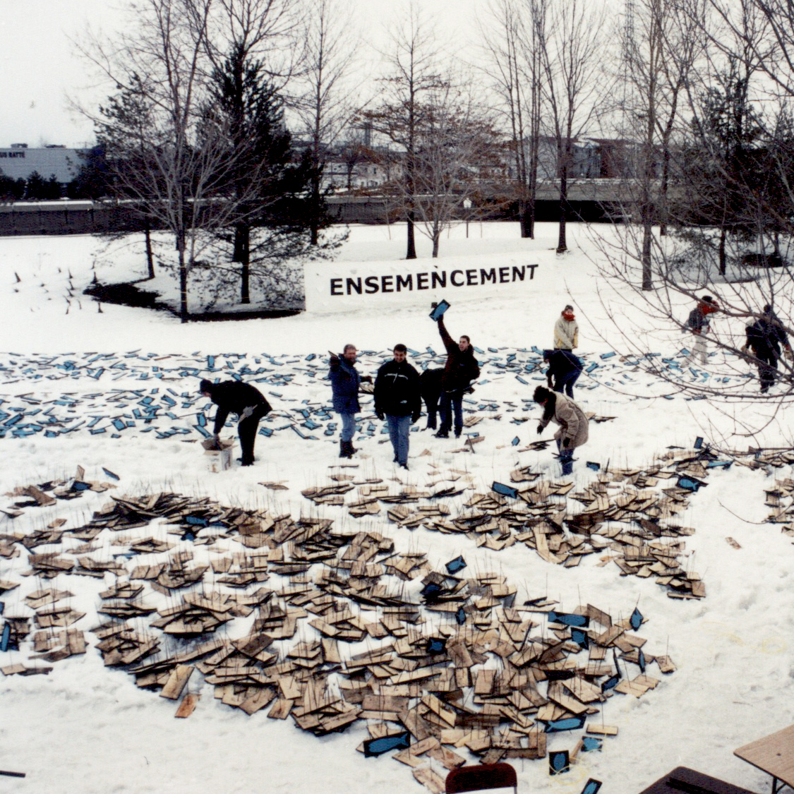 À Québec (Québec, Canada)en 2002, au Parc de la jeunesse, 5 000 tacons bleus ont été installés pour former une flèche indiquant la direction du Saguenay—Lac-Saint au jeunes jeannois et saguenéens qui ont migré vers les grands centres. Cette exode massive a provoqué une régression de la population sur cette région. Cette action performative conçue et produite par le collectif Interaction Qui avec la collaboration des étudiants (tes) en Arts et Technologie Informatisée du Collège d'Alma se voulait un cri d'alarme et d'espoir.